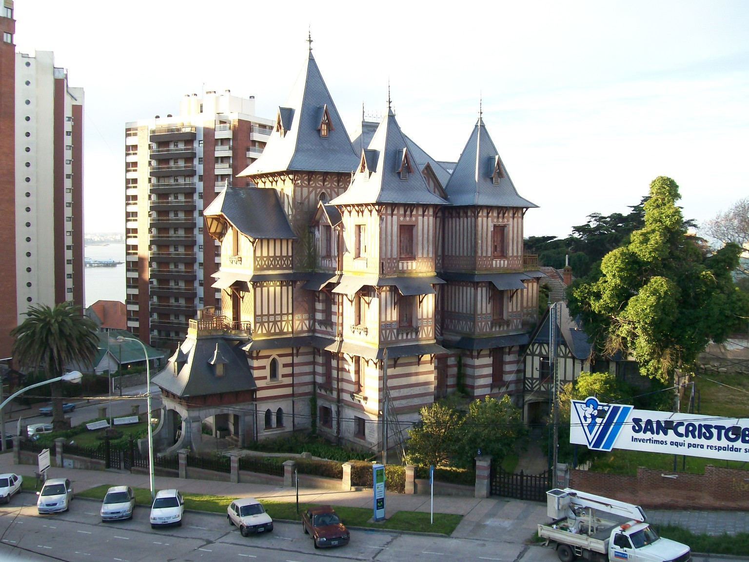 Museo Municipal de Arte Juan Carlos Castagnino (la antigua Villa Ortiz Basualdo) en Mar del Plata, Argentina.